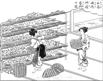 上垣守国 作 ; 西村中和,速水春暁斎 画『養蚕秘録』 丹後・丹波・但馬地方の江戸時代以前における養蚕の様子